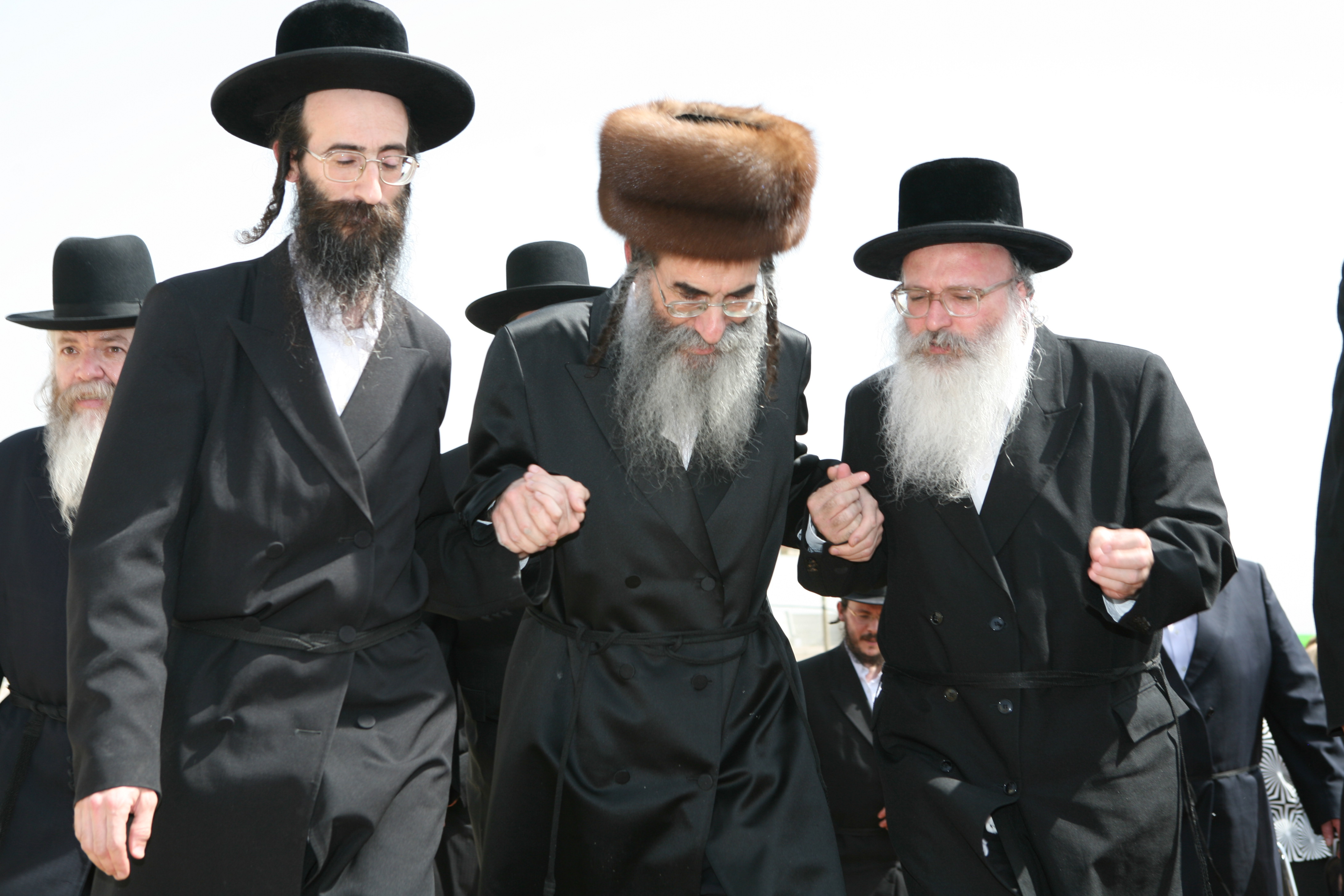 בהנחת אבן הפינה לבית הכנסת 'אלכסנדר' במודיעין עילית